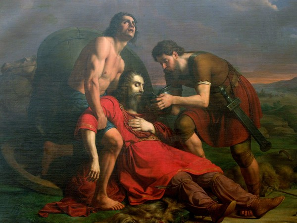 "Polistrate disseta Dario morente", olio su tela